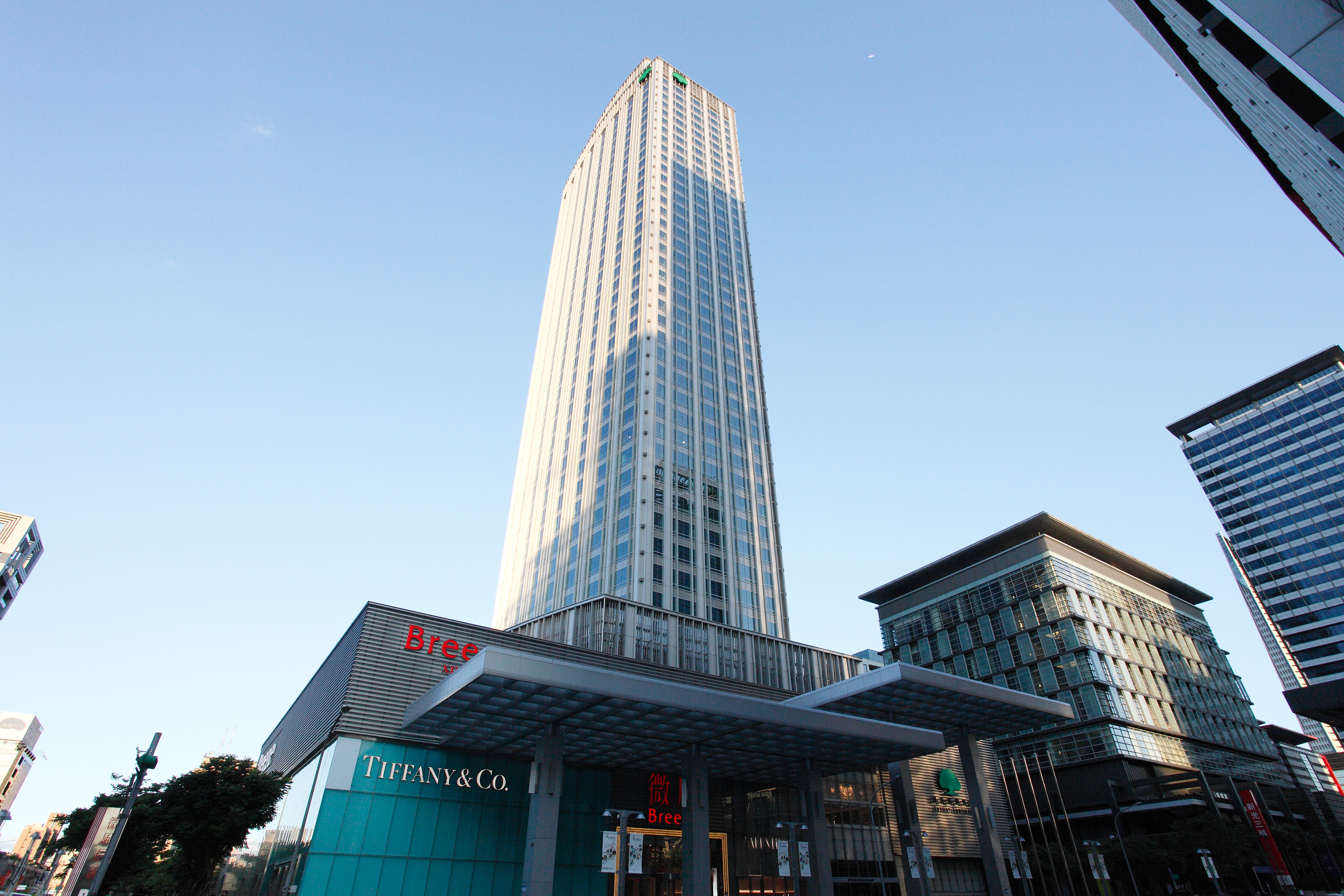 國泰置地廣場，位於臺北市信義區忠孝東路五段68號。微風信義設址於此。